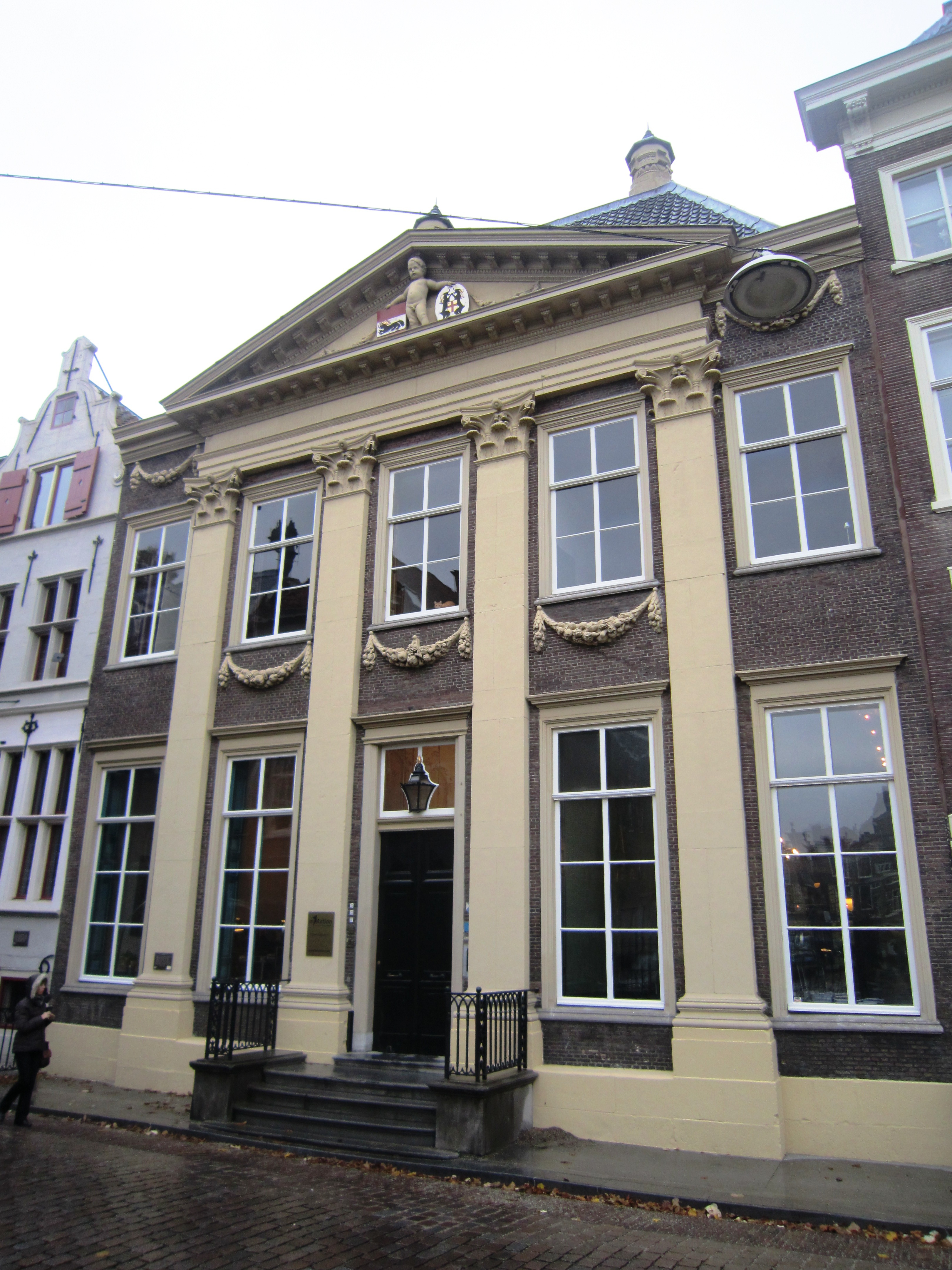 Dordrecht